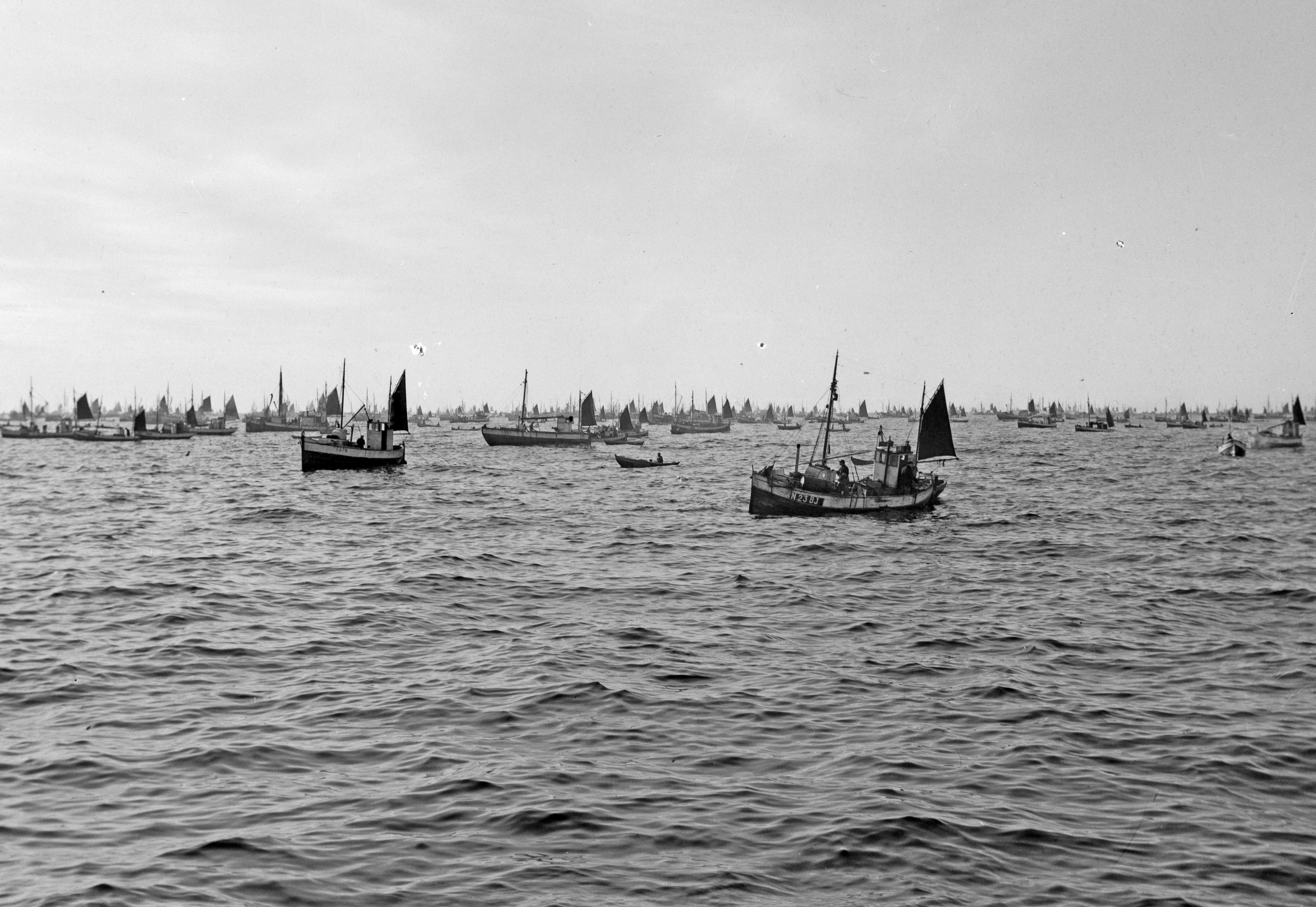 Bildet er hentet fra Nordlandsmuseet bildesamling etter Kanstad. Motivbeskrivelse: Fiskebåter i sjøen Nøkkelord: Fiske Fiskebåter med tilbehør og utrusting Båter og fartøyer